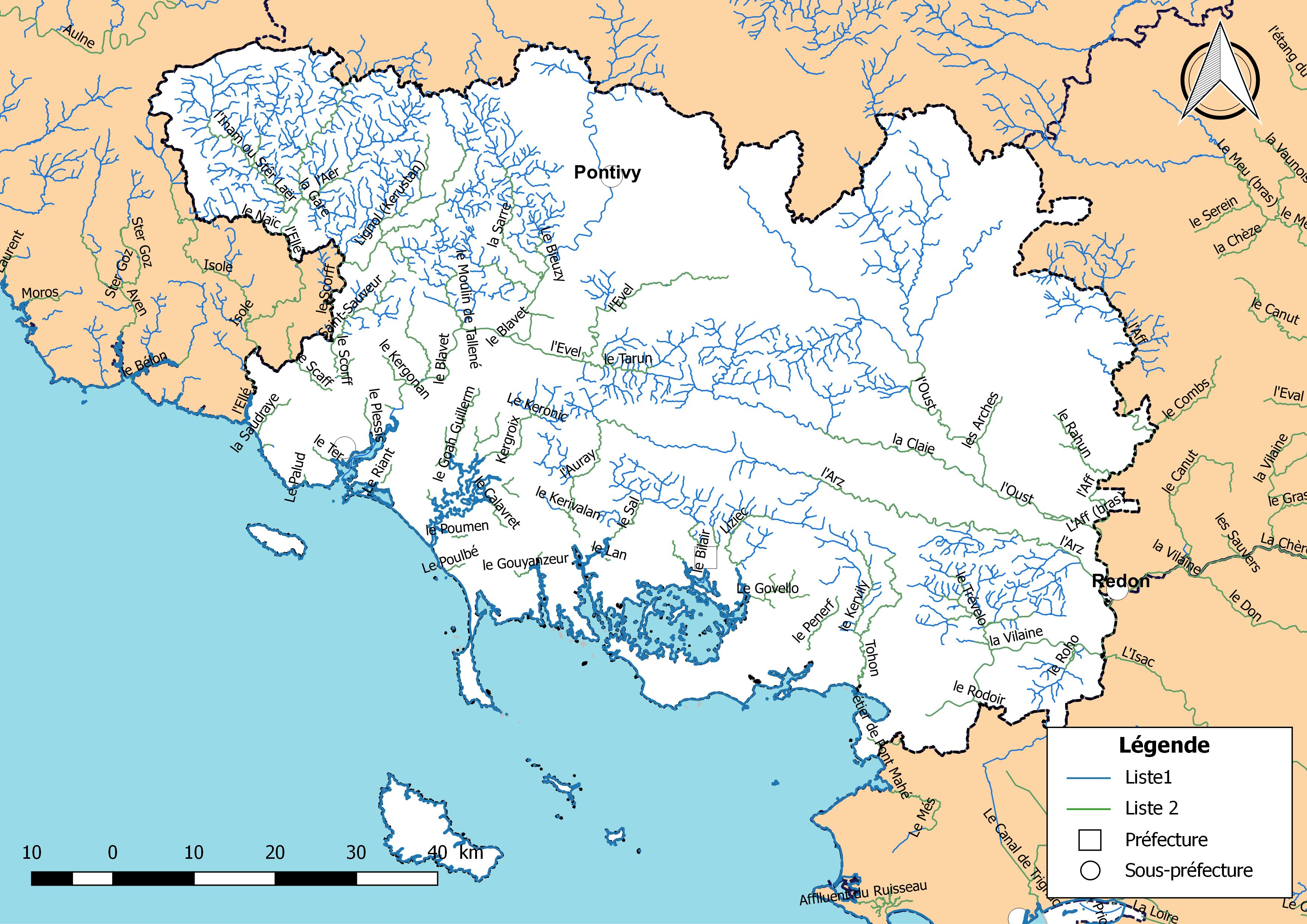 Classement des cours d'eau du département du Morbihan (France) au titre de la continuité écologique (article L214.17 I du Code de l'environnement).